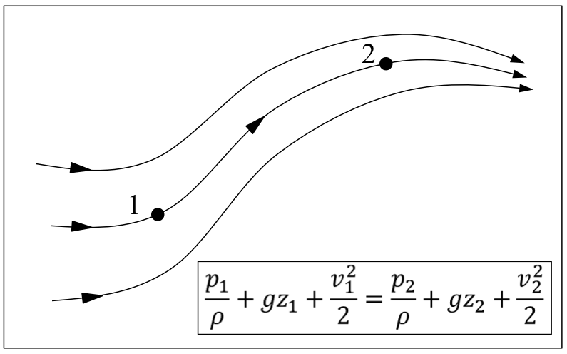 Korronte-lerro bati dagokion Bernouilliren ekuazioaren azalpen grafikoa.